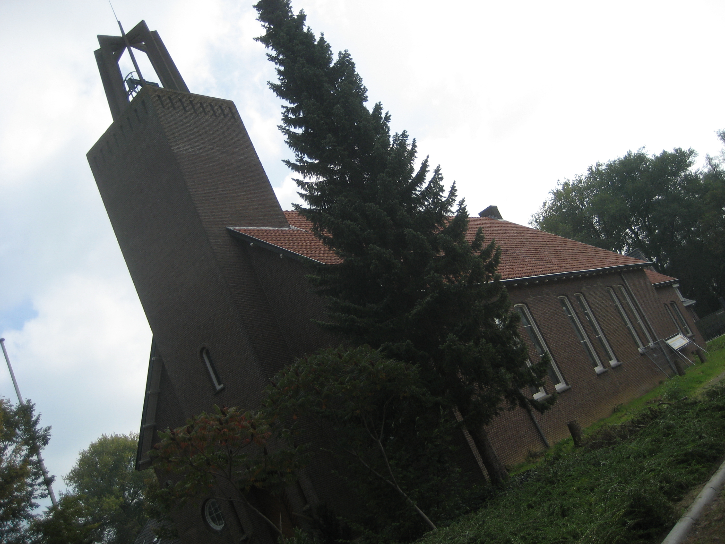 Koppelkerk (Gereformeerde Kerk) in Bredevoort (Nederland)